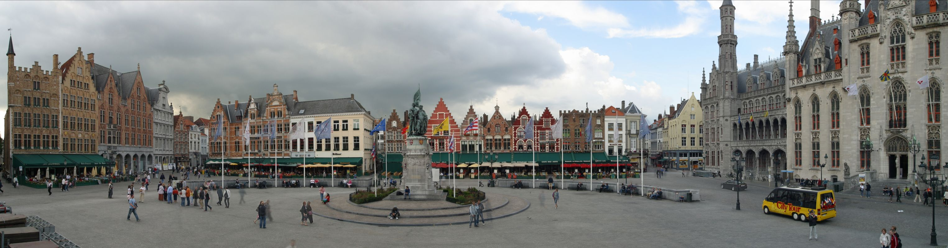 Bruges